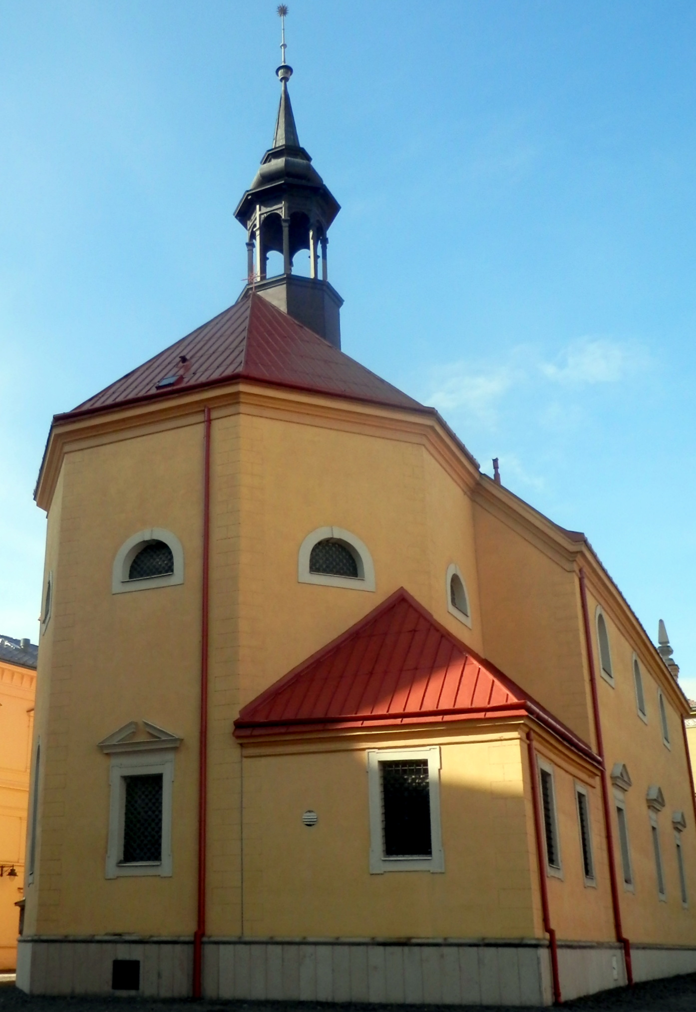 Evanjelický kostol a.v. Hlavná ulica mesto Prešov, Slovensko.